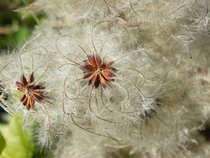 Infrutescence sèche de clématite flambante.